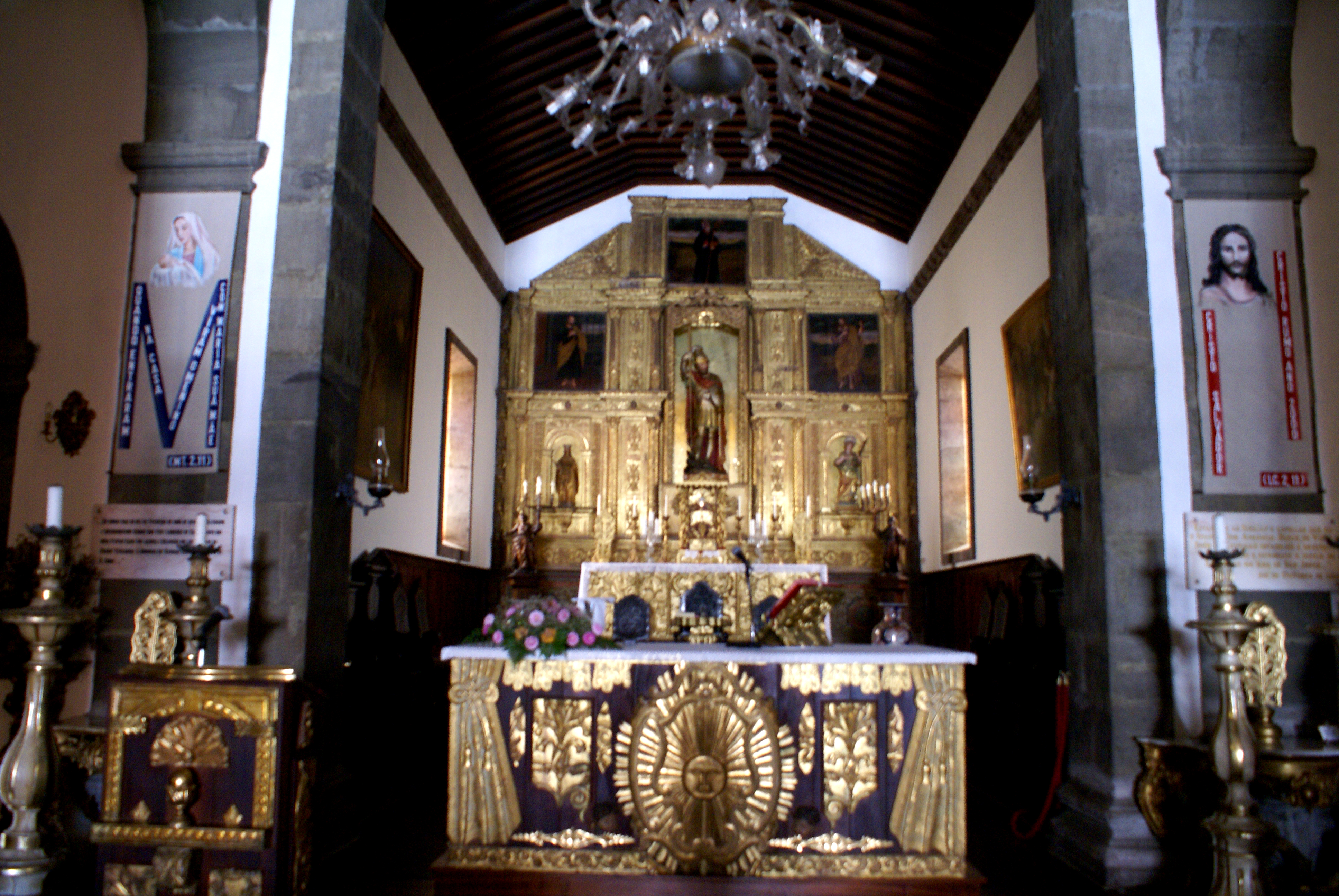 Igreja de São Jorge, altar-mor, Velas, Ilha de São Jorge, Açores